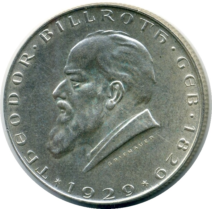 Bildseite der 2-Schilling-Gedenkmünze aus dem Jahr 1929